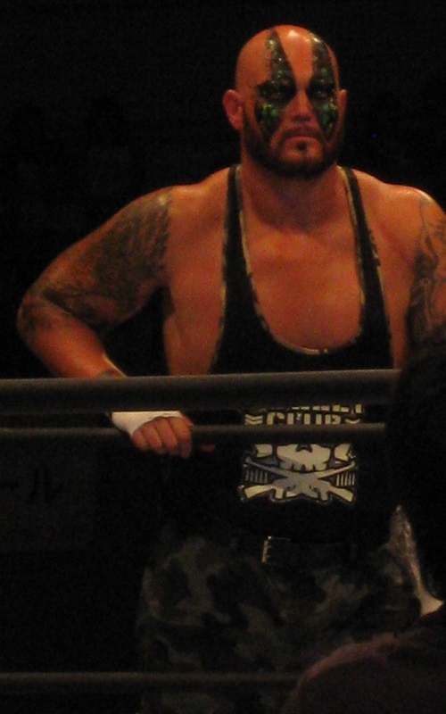 2014年6月21日 大阪府立体育会館 「DOMINION6.21」 ドク・ギャローズ